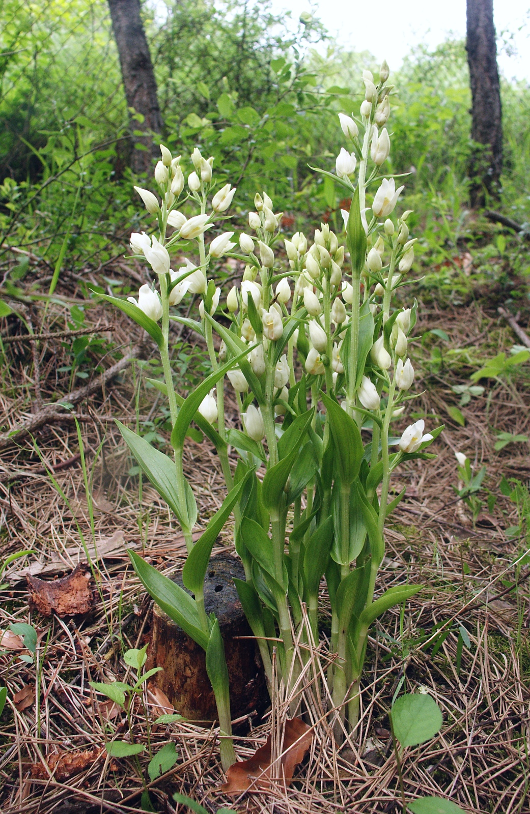 Cephalanthera damasonium, Tauberland, Germany